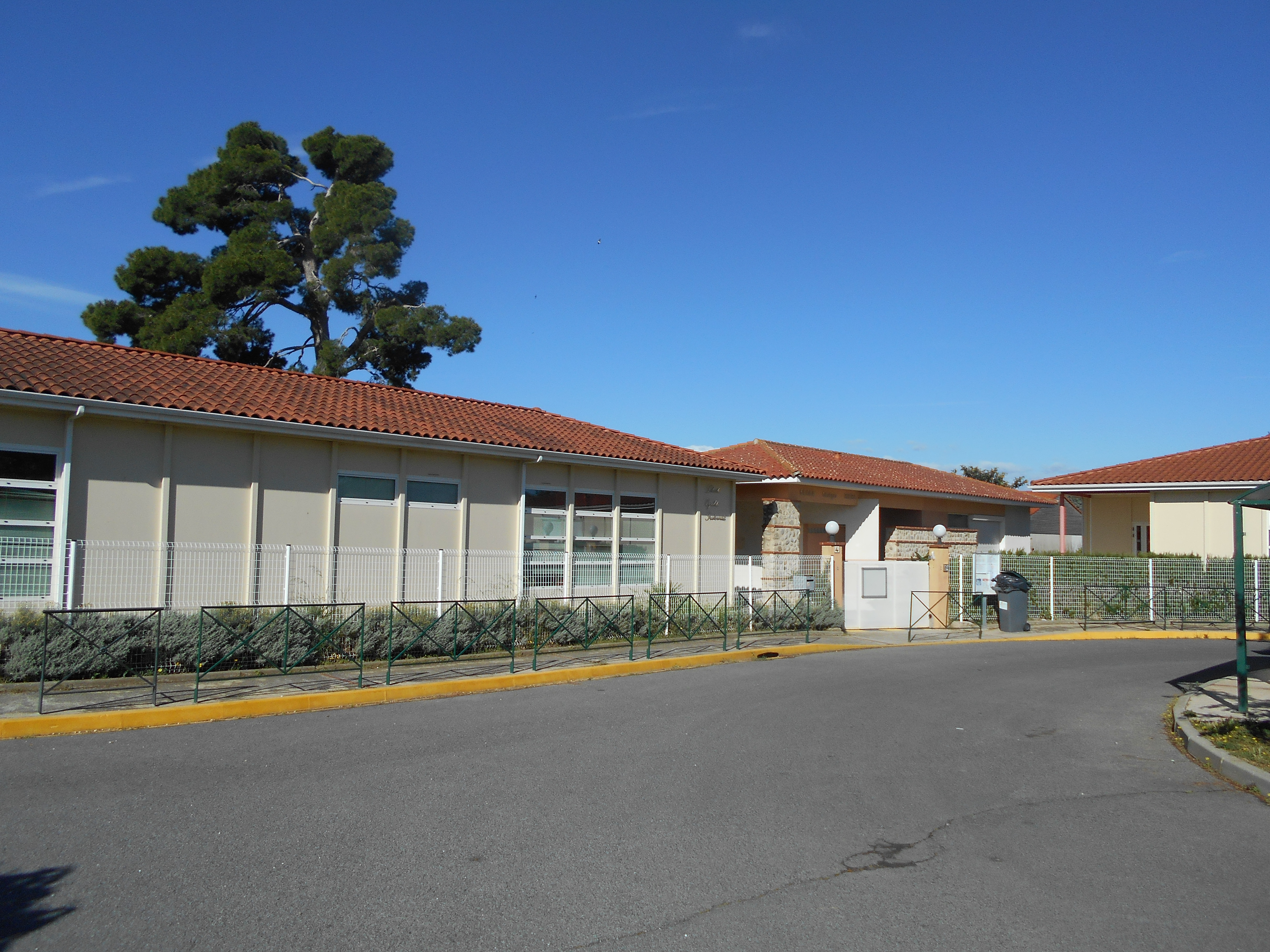 Unknown language: Escola de Sant Joan la Cella